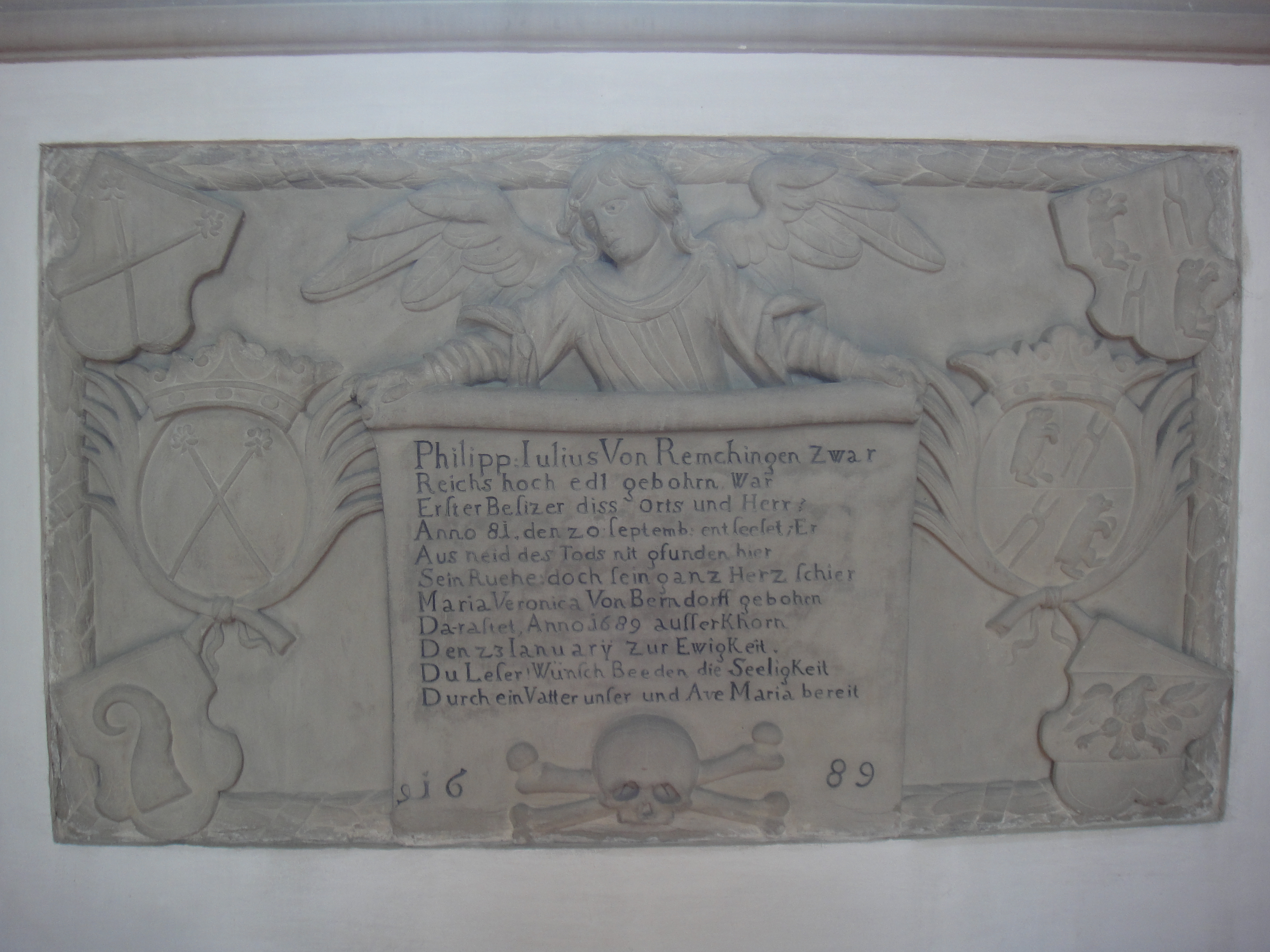 Grabstein Epitaph für Philipp Julius von Remchingen (*1606, +1681) und seine Frau in der Pfarrkirche St. Michael in Apfeltrang, Gemeinde Ruderatshofen. Datiert 1689. Remchingen konvertierte 1640 zum katholischen Glauben. Mit Allianzwappen Remchingen / Berndorf sowie Ahnenwappen Remchingen, Gaisberg, Berndorf, Syrgenstein